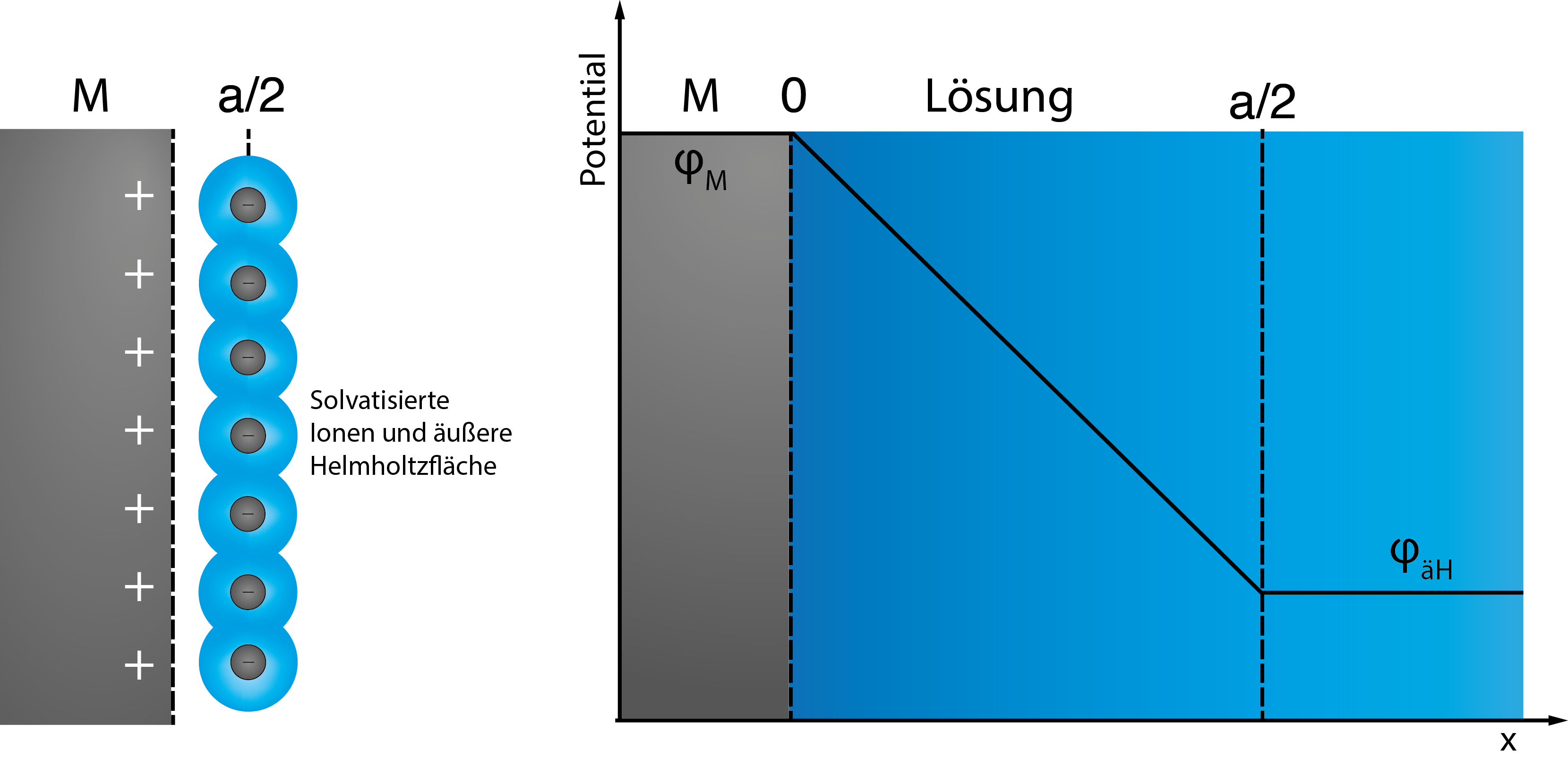 Der Potentialverlauf zwischen Elektrode und äußerer Helmoltzfläche. M = Elektrodenmetall; äH = äußere Helmholtzfläche; a/2 = Radius der hydratisierten Ionen